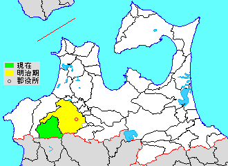 Map of Nakatsugaru District, Aomori, Japan